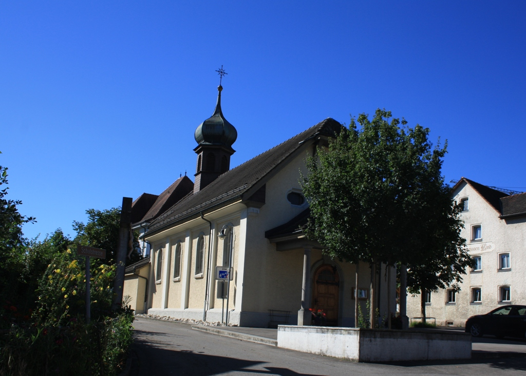 Kapelle in Freienwil, Aargau, Schweiz